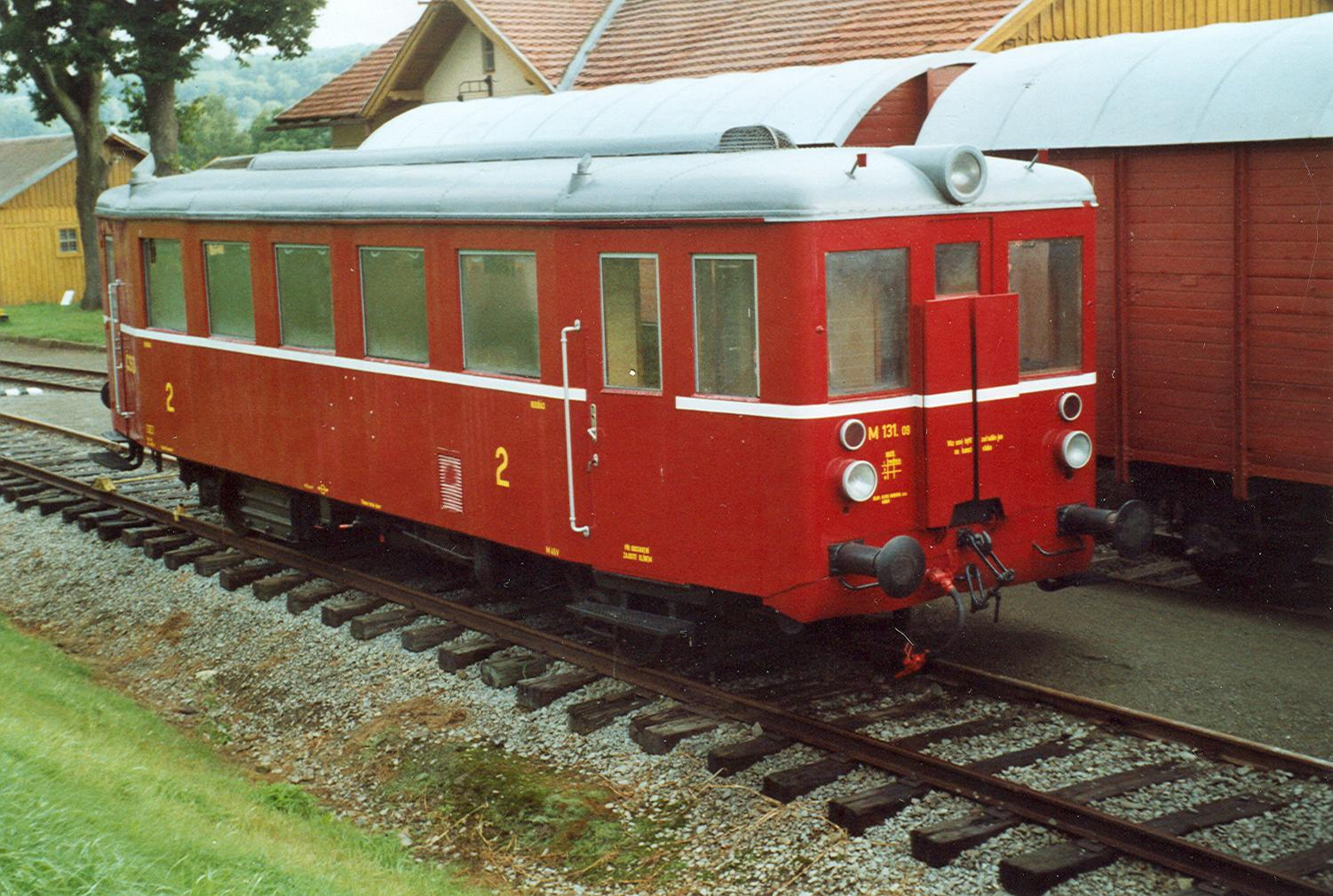 Triebwagen der Reihe M 131.1 vor dem Empfangsgebäude in Saubernitz.